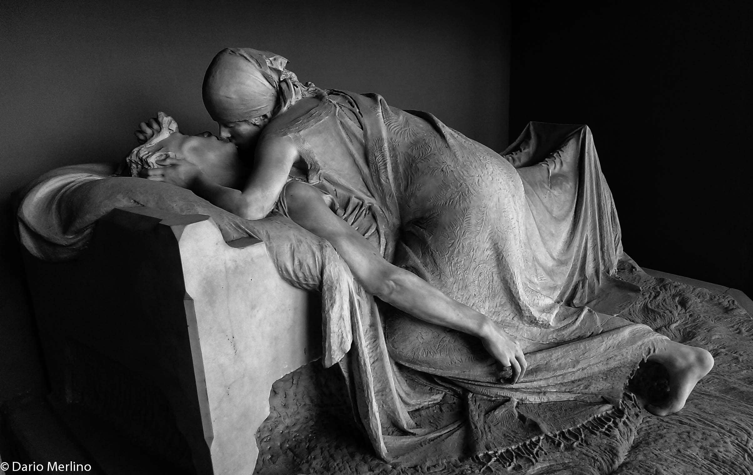 cimitero monumentale di Milano This is a photo of a monument which is part of cultural heritage of Italy.